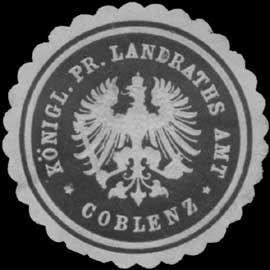 Sealing stamp Title: K.Pr. Landrathsamt Koblenz Description: Coblenz, schwarz, weiß, geprägt Place: Koblenz size: 3 cm